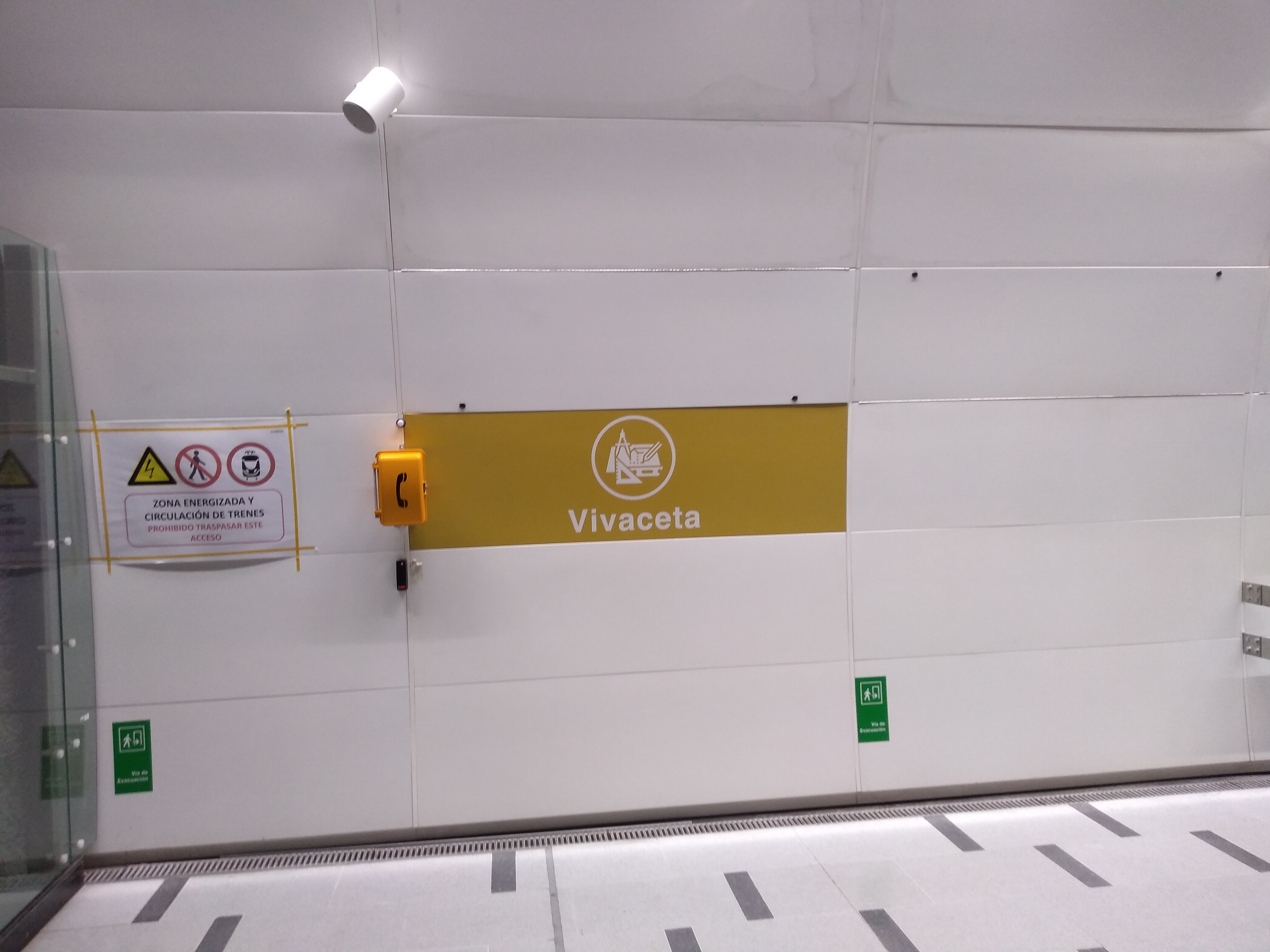 Estación Vivaceta